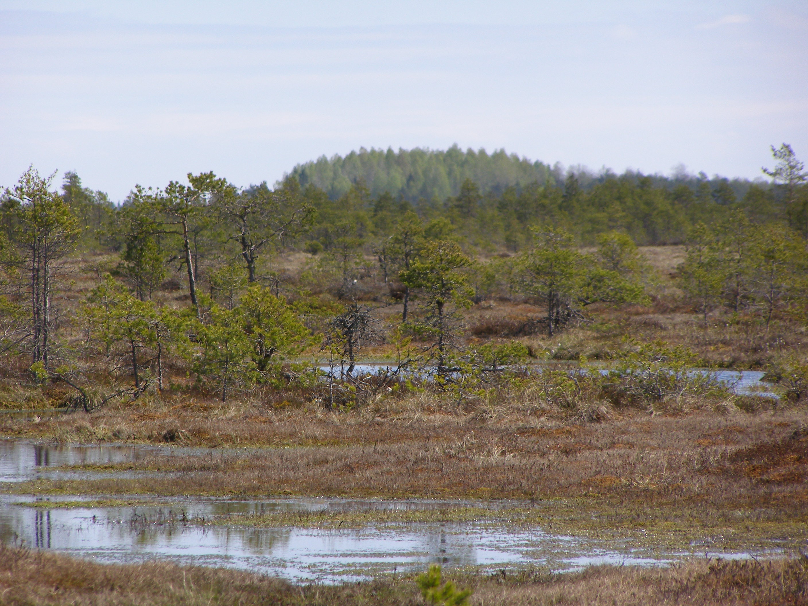 Sirtsi soo keskosa